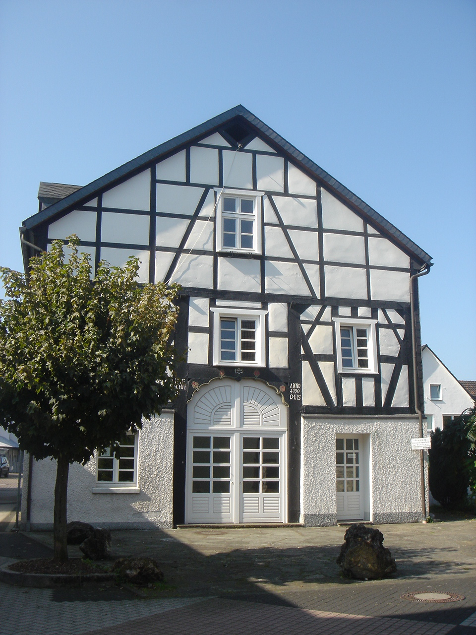 Lohgerberhaus